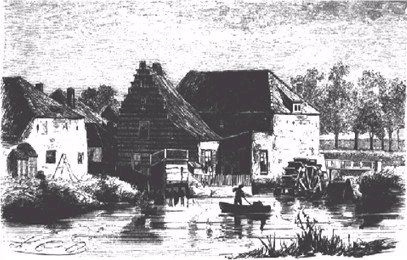 pentekening getijdenwatermolen Bergen op Zoom